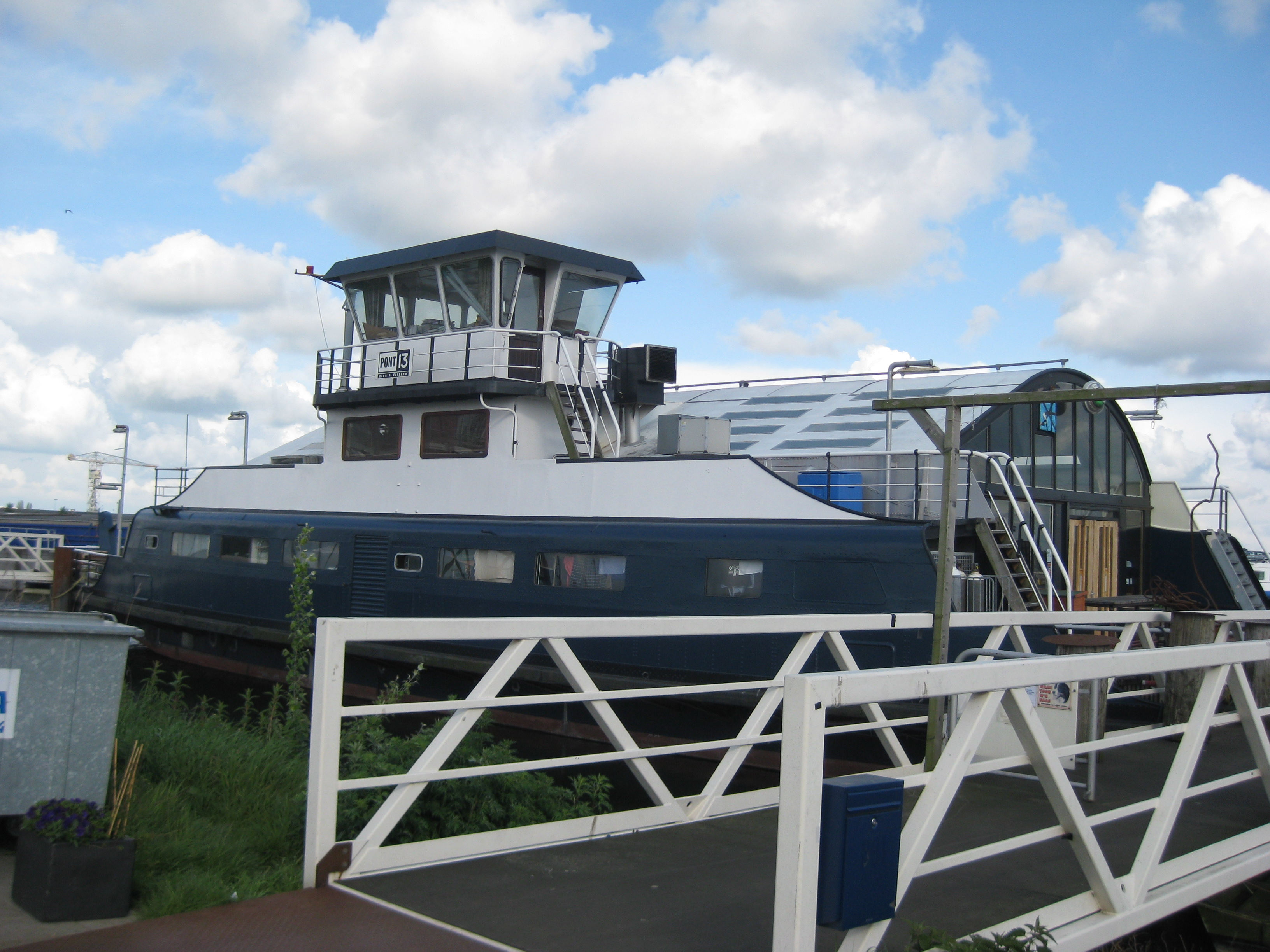 Stoompont 13 uit 1927. Terug in Amsterdam als restaurant